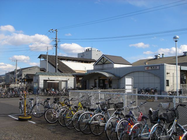 è˜‡åŽŸé§…ï¼ˆJRæ ±æµ· é«˜å±±æœ¬ç·šã€ å² é˜œçœŒja:å „å‹™åŽŸå¸‚ï¼‰ 2005å¹´2æœˆ26æ—¥ã «æ’®å½±